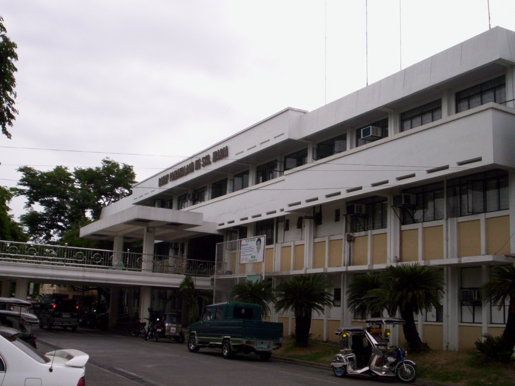 Santa Maria Municipal Hall (Bulacan). Bahay Pamahalaan ng Santa Maria.